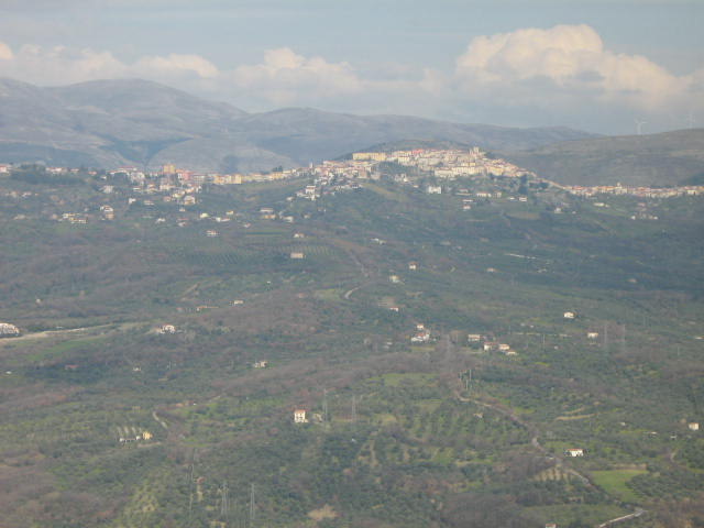 Panoramic view of Buccino. Photo made in Castelluccio Cosentino